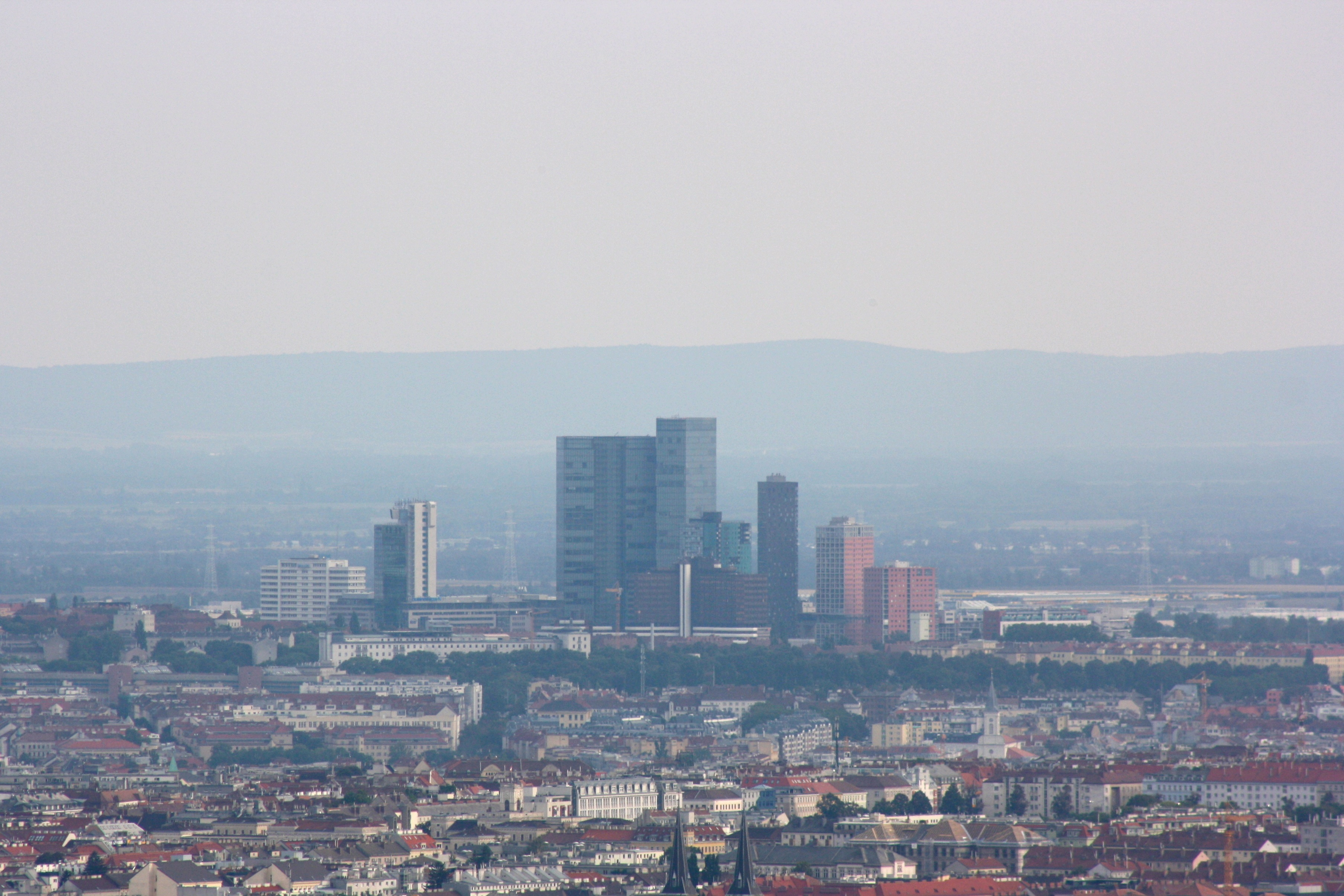 Hochhäuser der Wienerberg City, Ansicht vom Neuberg in Wien-Döbling.